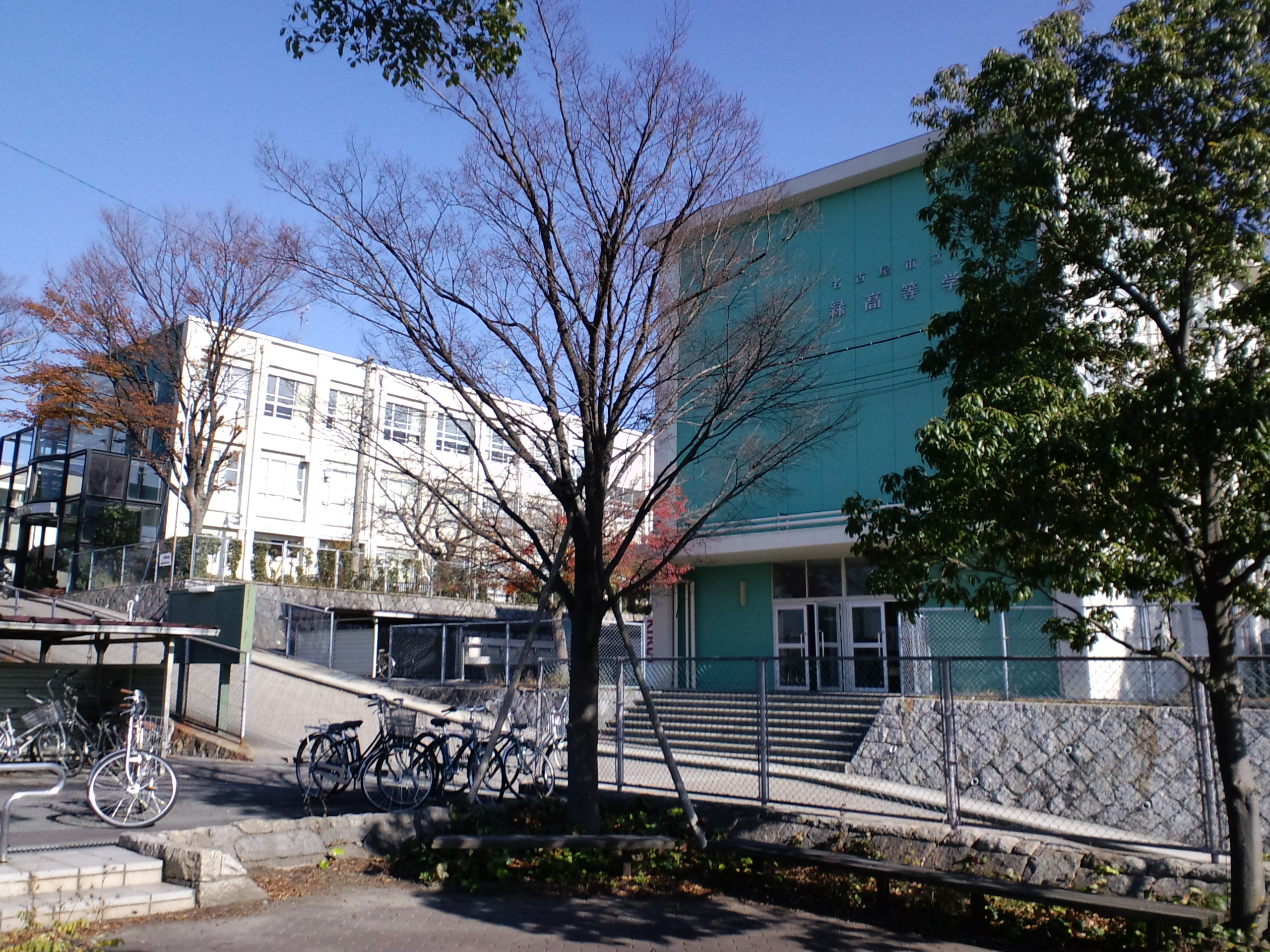 名古屋市立緑高校の写真です。